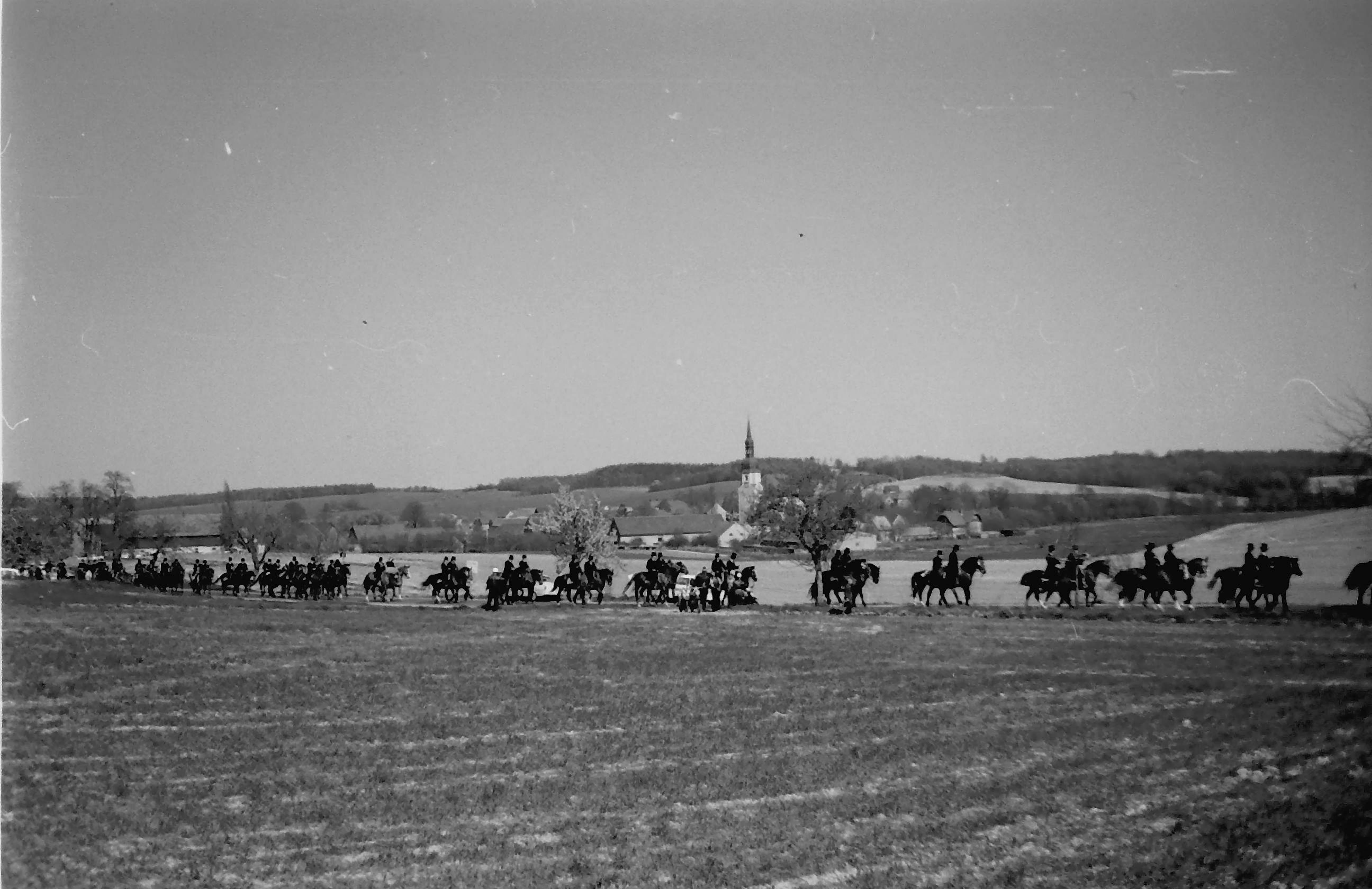 Hornjoserbsce: Jutrowne jěchanje w Chrósćicach, 1972